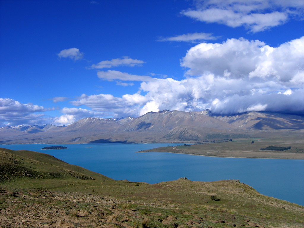 Lake Tekapo, South Island, New Zealand